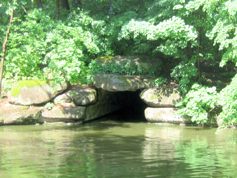 Ахеронтское озеро.